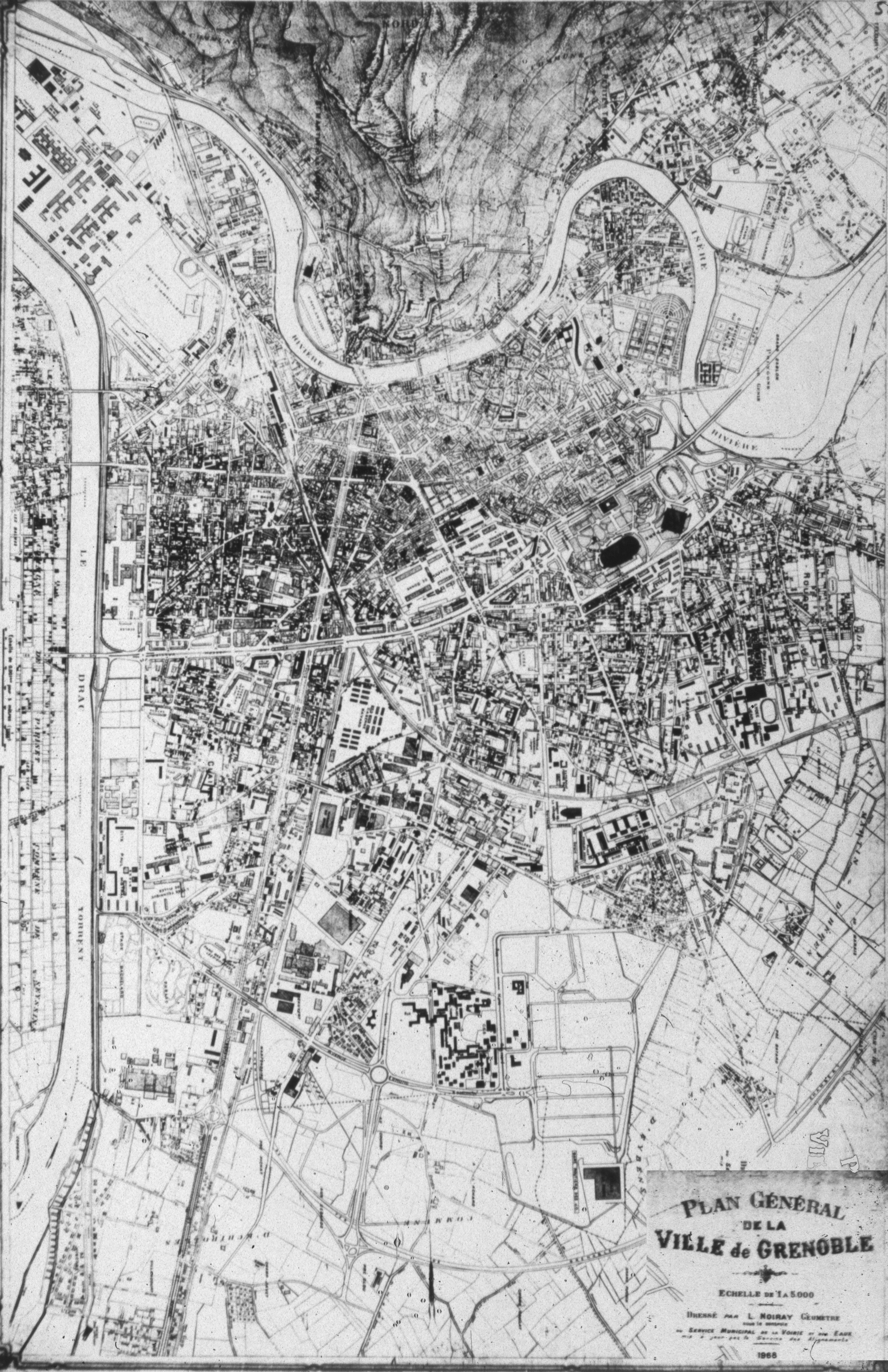 Grenoble en 1968 : Village Olympique, autoroute, gare routière des JO, échangeur des Sablons, A480 et rocade sud en partie. Le CENG est installé sur le polygone.